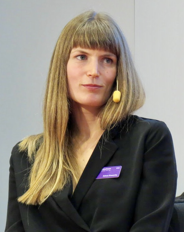 Helena Granström på Bokmässan i Göteborg 2018.